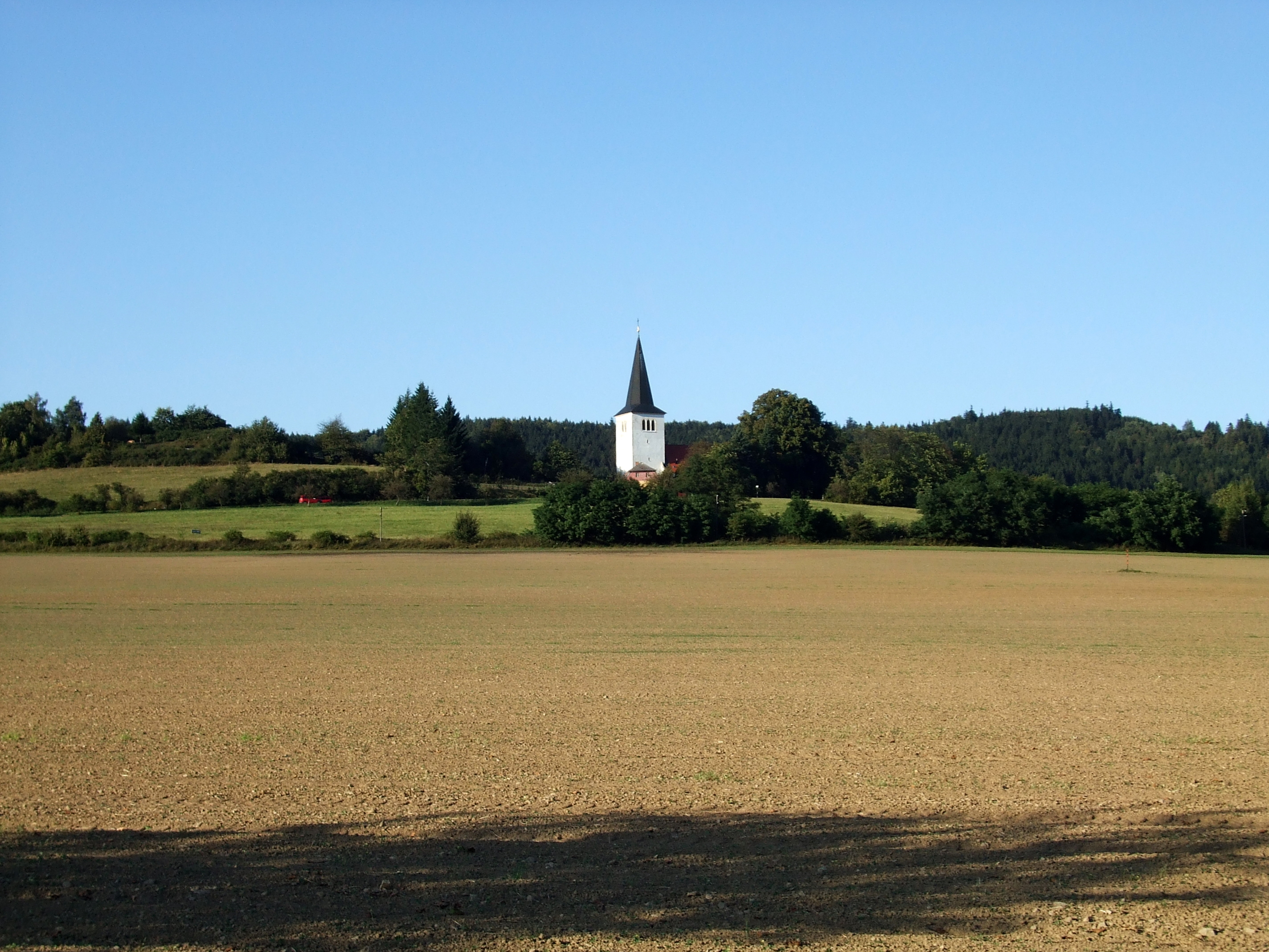 Loučimský kostel